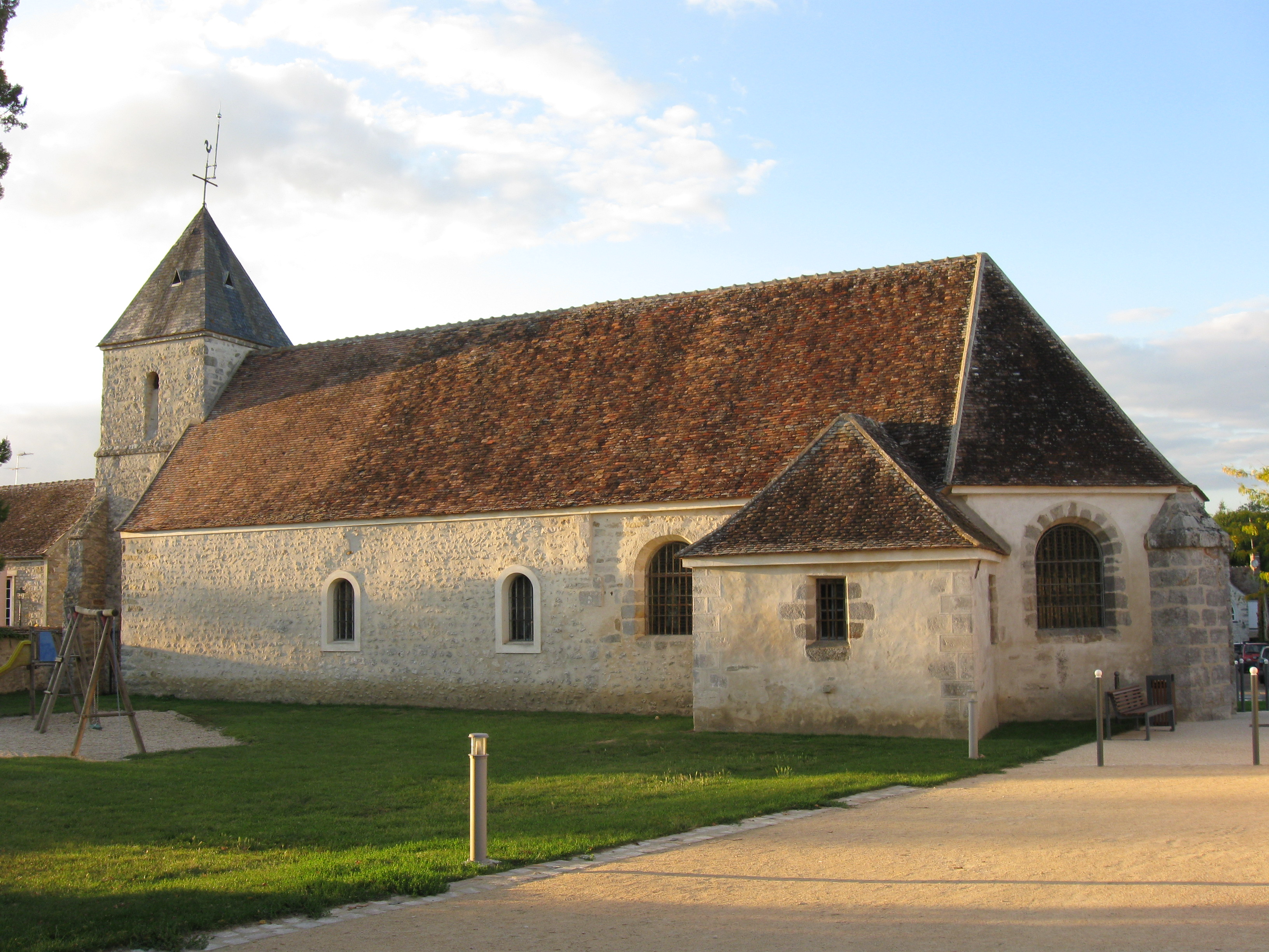 Église Saint-Pierre-aux-Liens d'Épisy (département de la Seine-et-Marne, région Île-de-France).